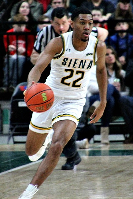 Siena freshman guard Jalen Pickett